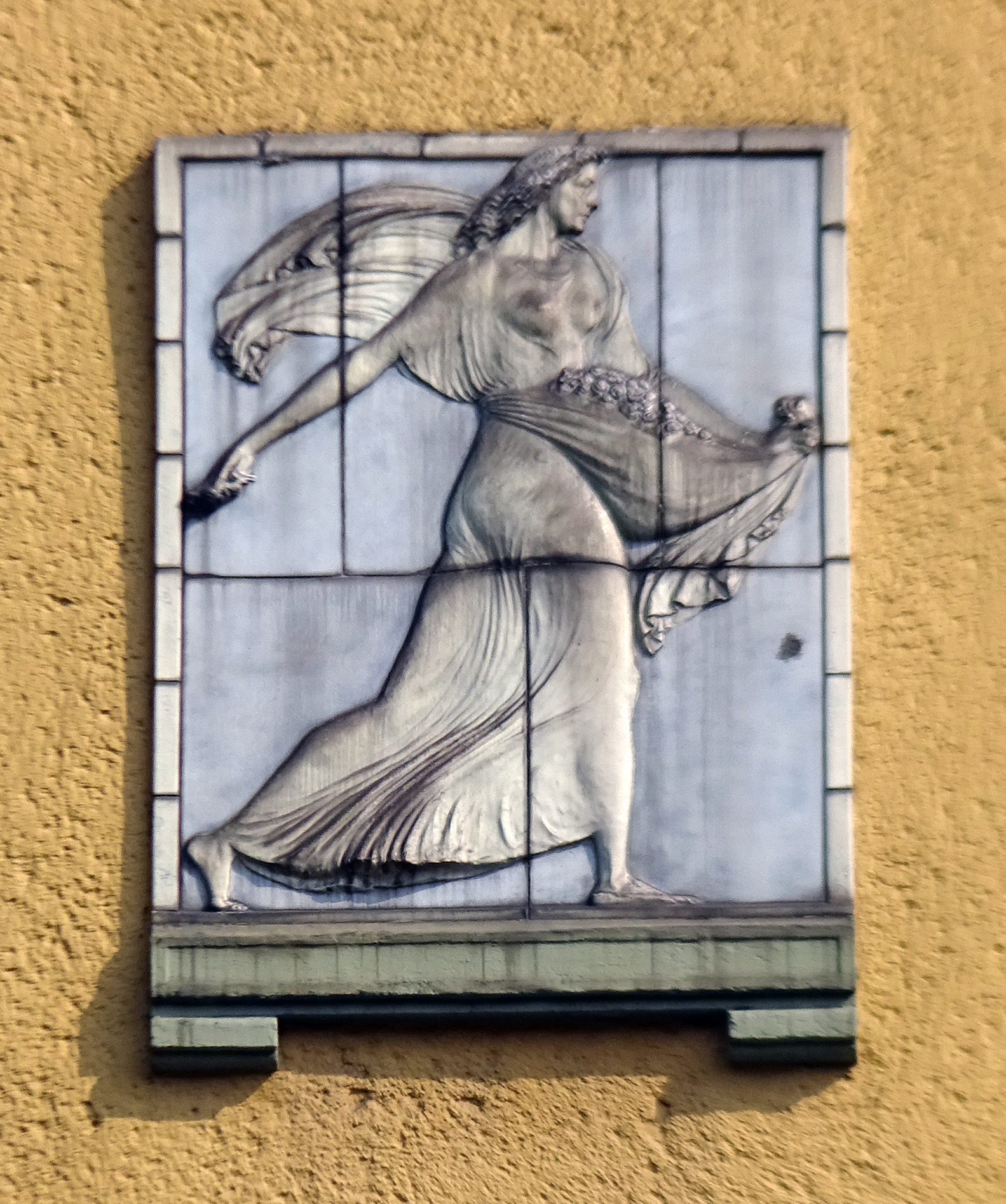 "Die Säende" an der Fassade des Haus Düsseldorferstraße 30 in Düsseldorf-Oberkassel